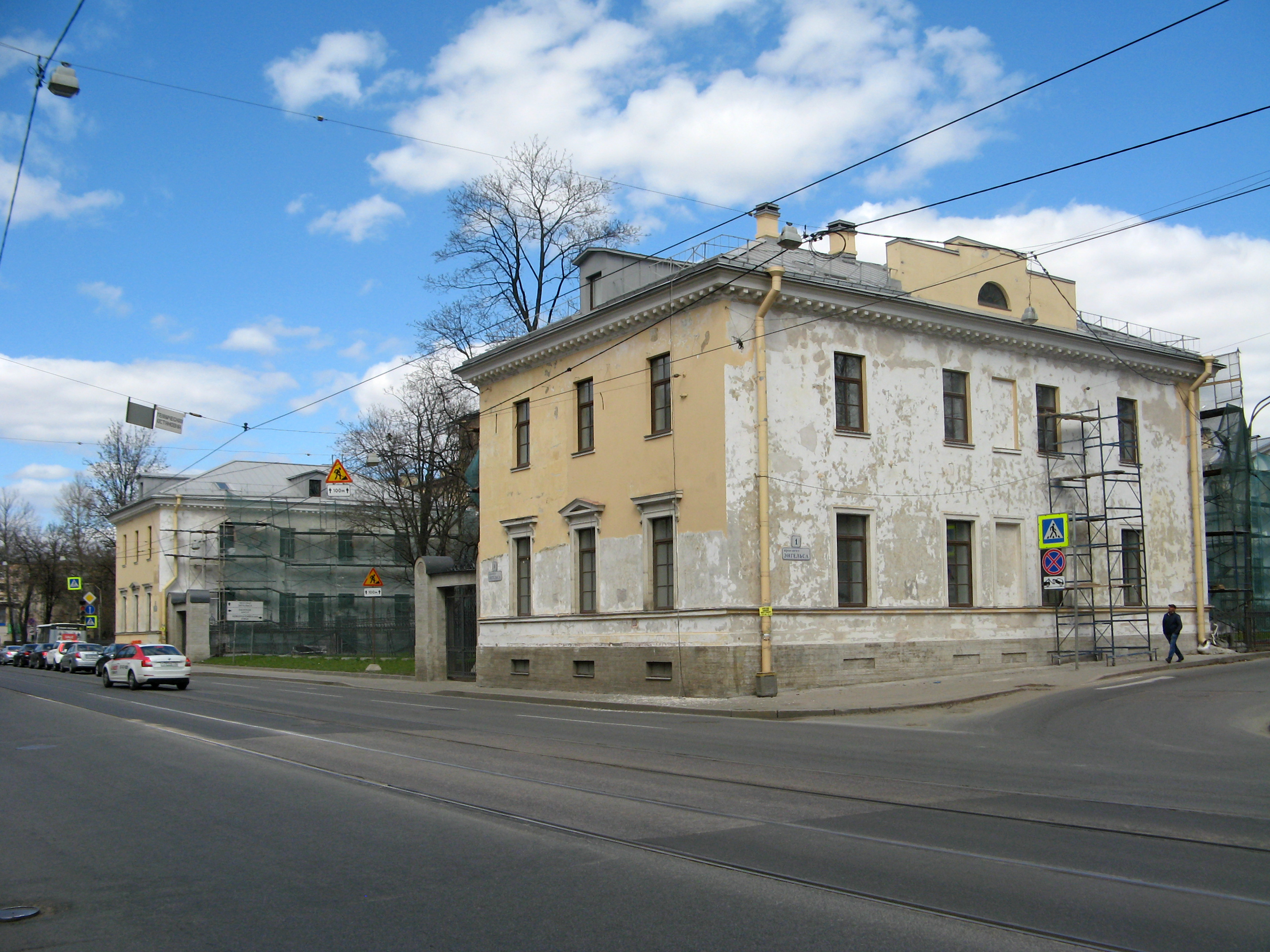 Комплекс Орлово-Новосильцевской богадельни: проспект Энгельса, 1, 3, 5, Выборгский район, Санкт-Петербург